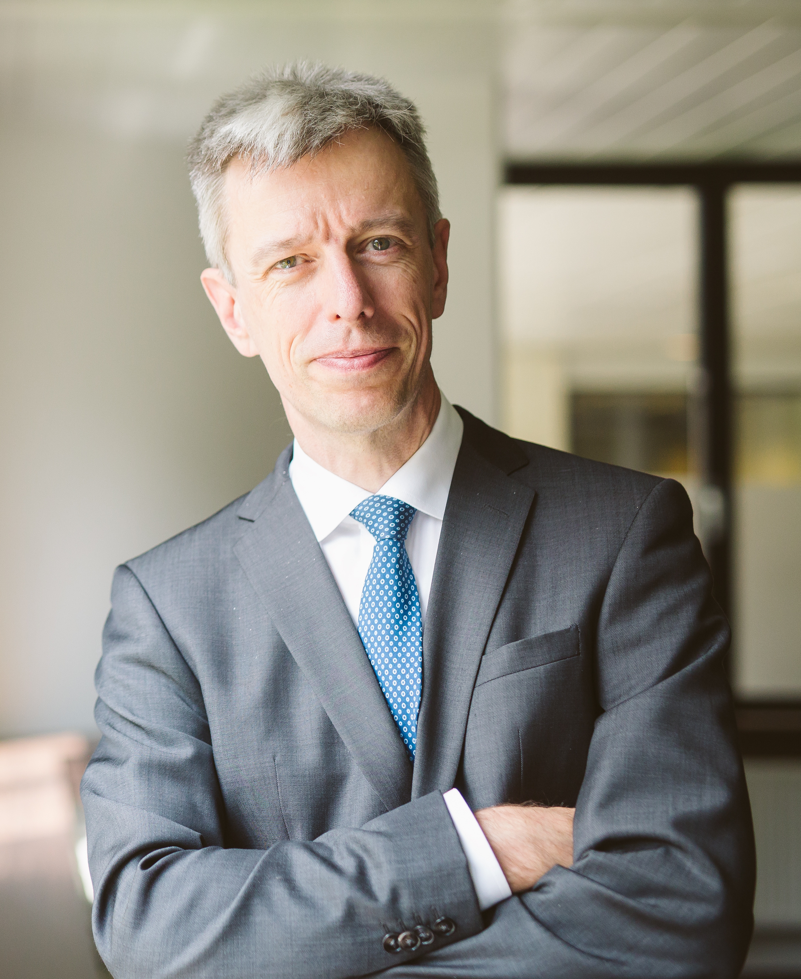 Geert Noels - Antwerpen (Wilrijk) - Econopolis